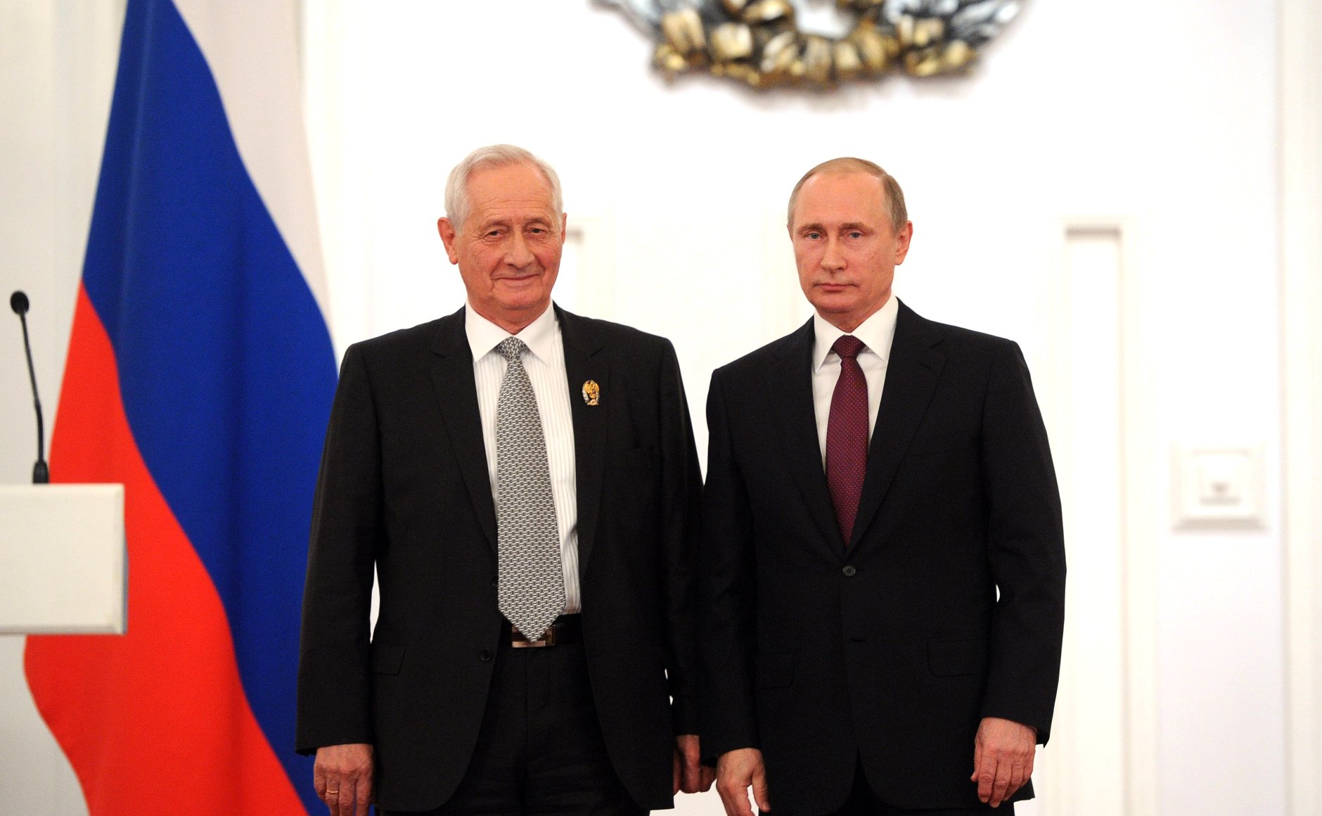 Церемония вручения Государственных премий Российской Федерации. С лауреатом Государственной премии в области науки и технологий Эриком Галимовым